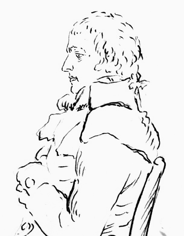 Klara Reinhart (1777–1748): Johann Samuel von Gruner (1766–1824), Geologe, Oberberghauptmann der Helvetischen Republik, um 1800. Federskizze, 21 x 20 cm. Burgerbibliothek Bern, Neg. 4101 (Ausschnitt).